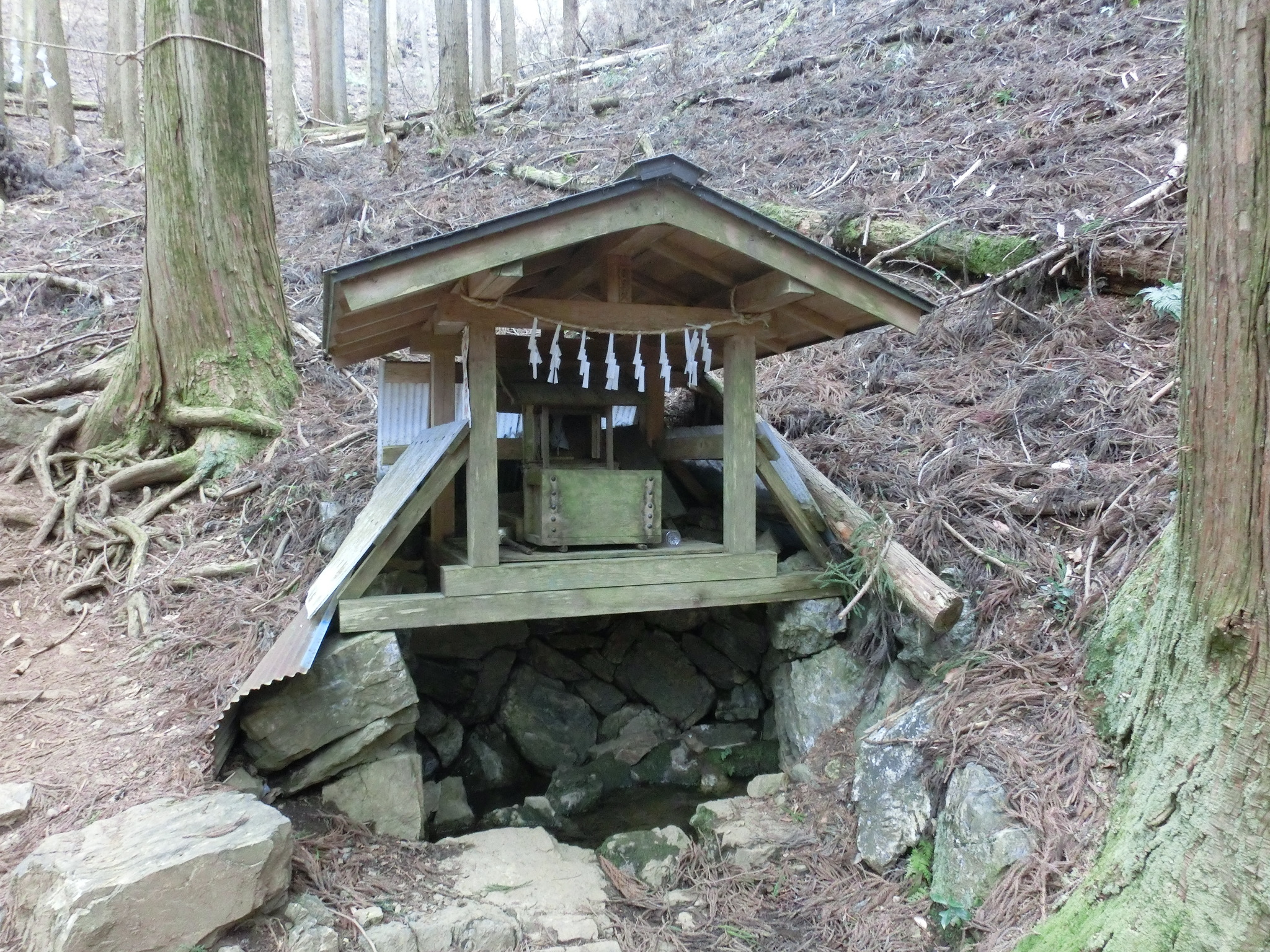 青渭神社の泉